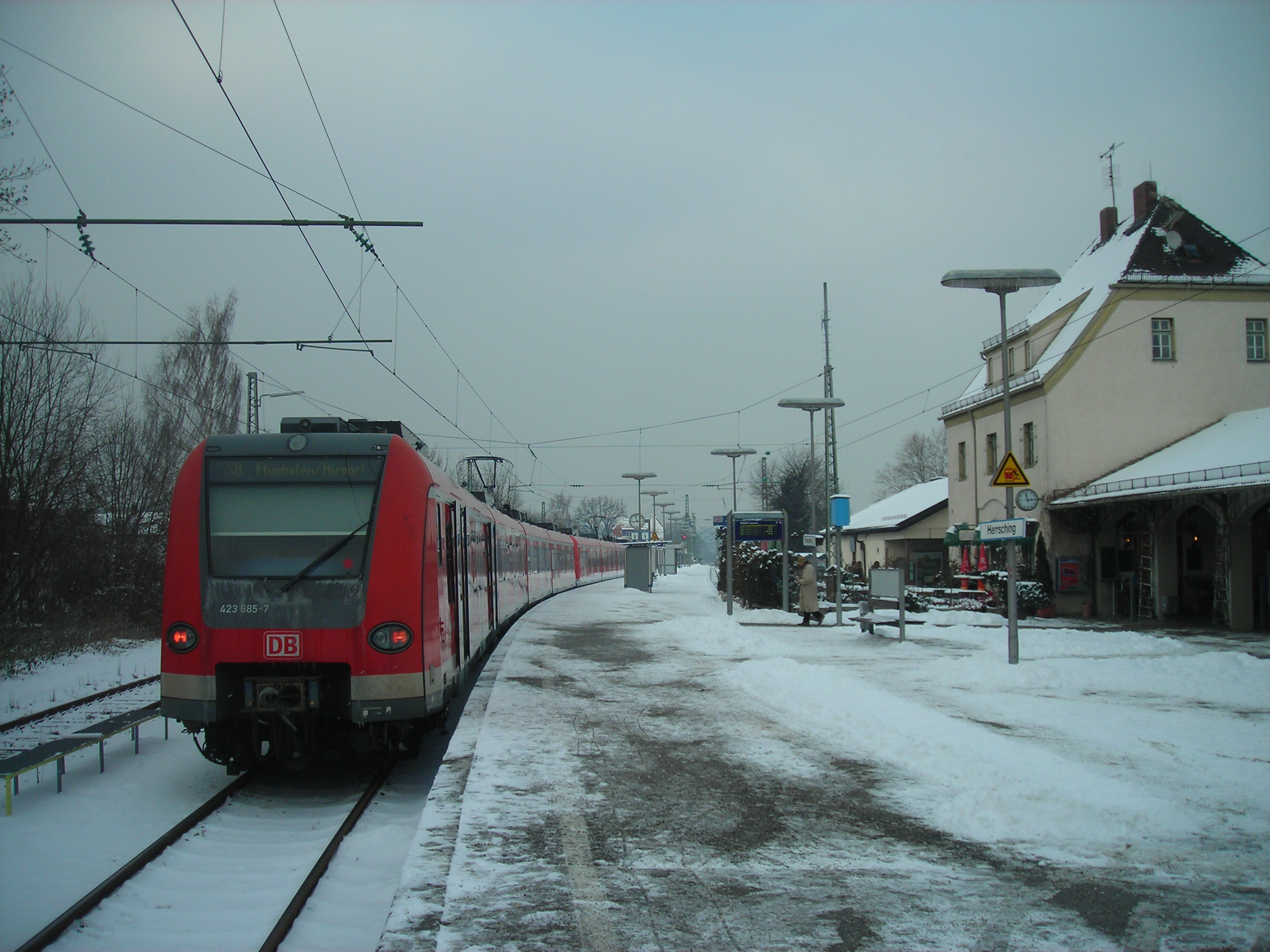 Herrsching állomás